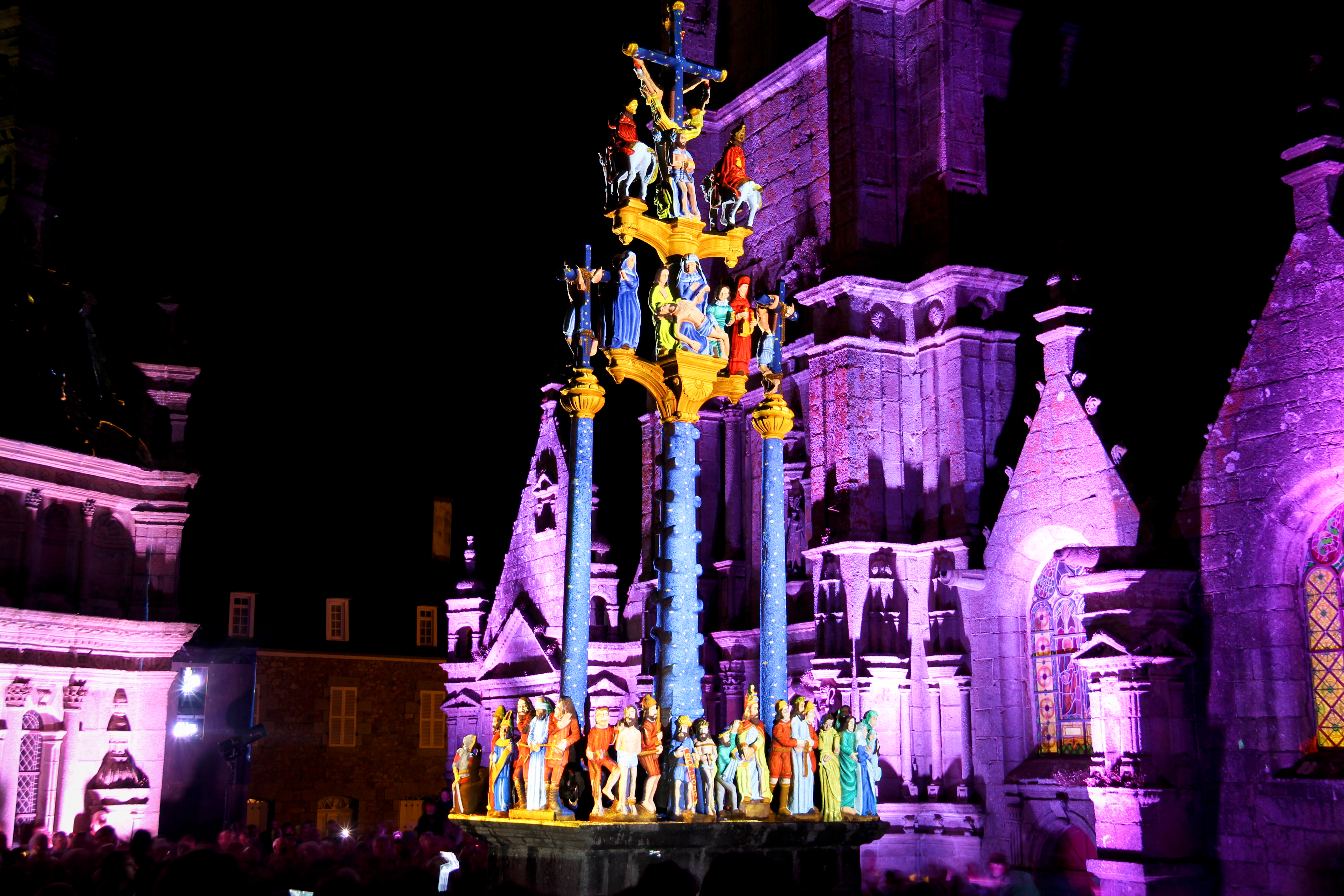 Calvaire colorisé lors du festival "Quand les calvaires s'illuminent". .